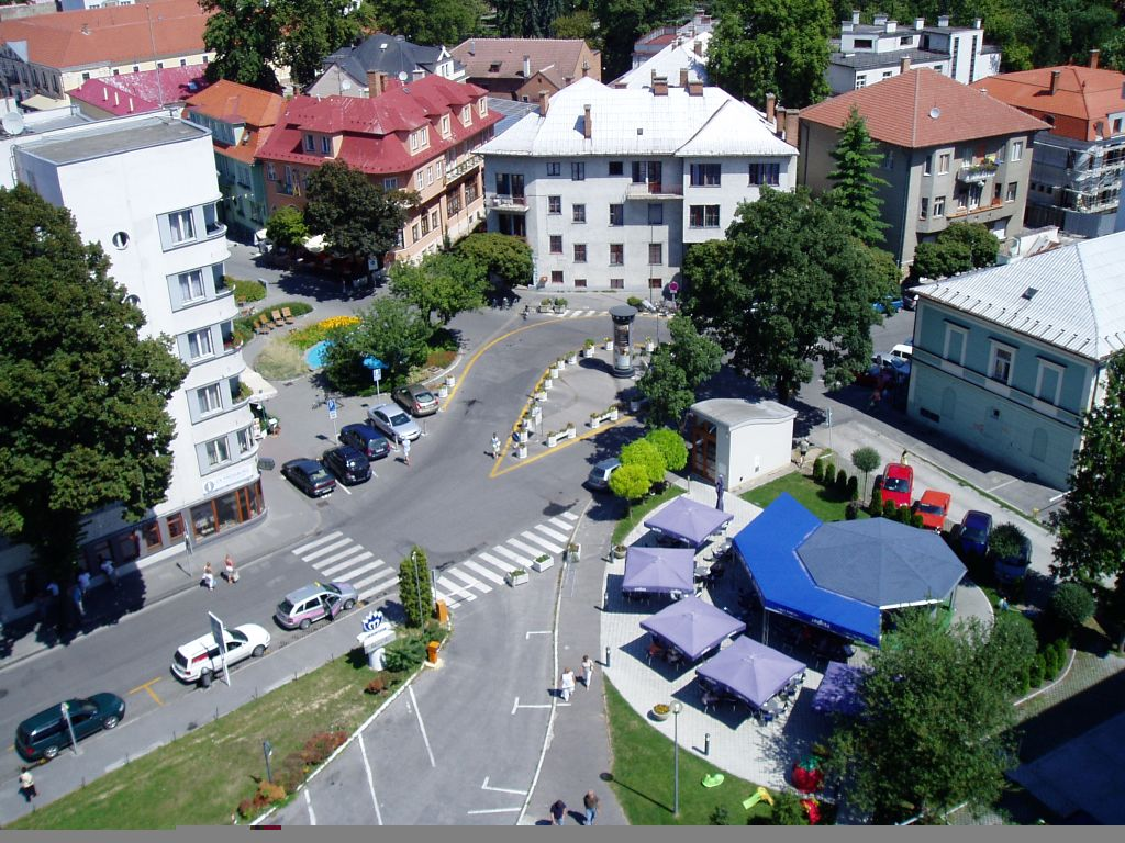 mesto z výšky